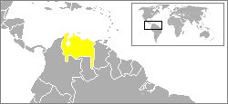 Territorio de Klein-Venedig, ubicado en Colombia y Venezuela.